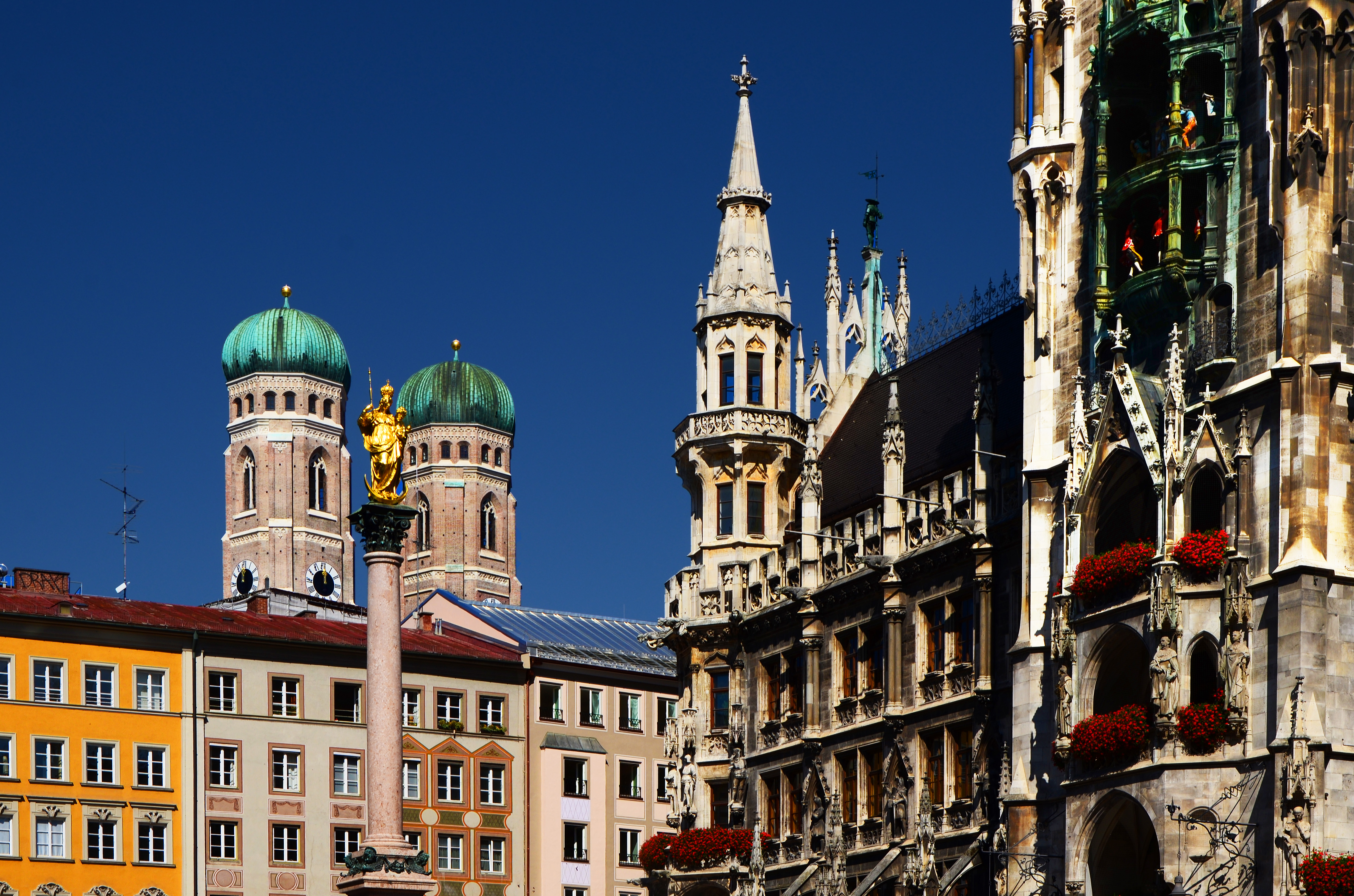 Marienplatz mit Mariensäule,Frauenskirche und Neues Rathaus